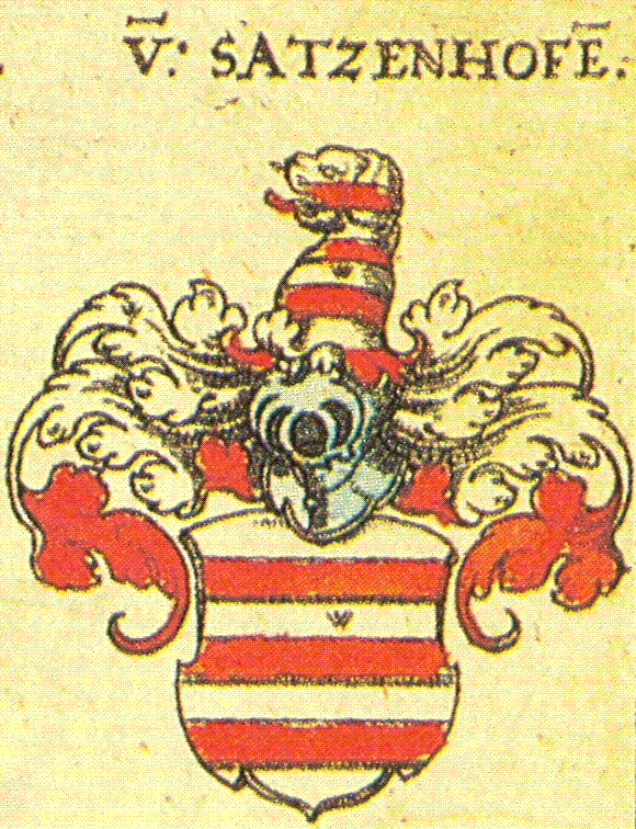 Wappen der Familie von Sazenhofen nach Siebmachers Wappenbuch